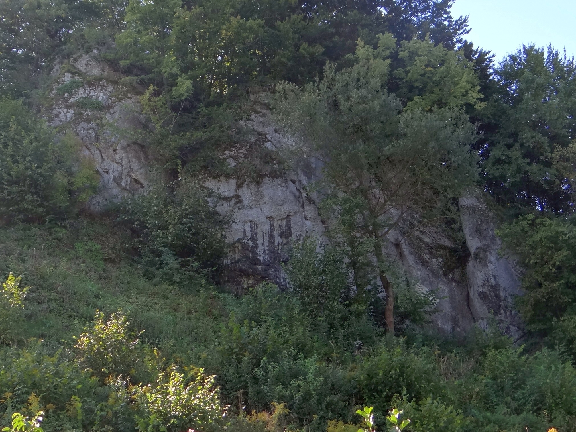 Skała Zakątek w dolinie Brodłówki